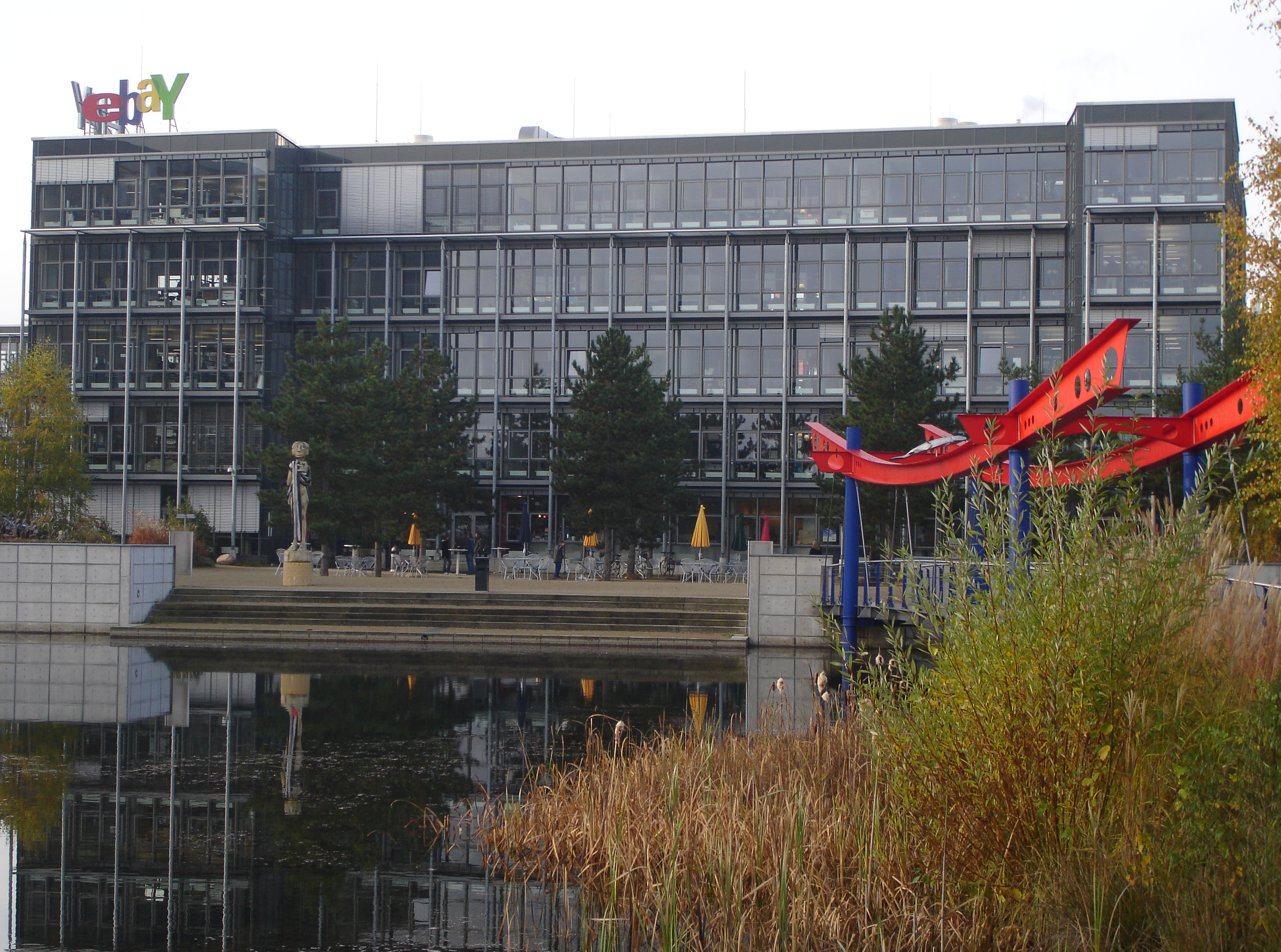 Kleinmachnow Ebay Zentrale / Ebay headquarter